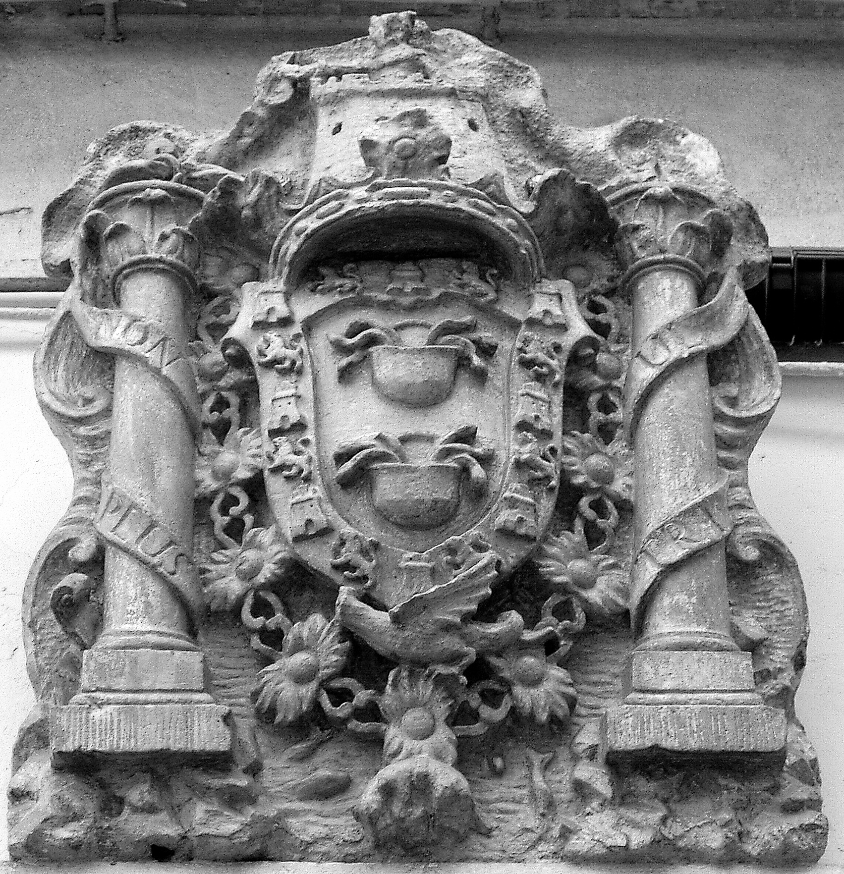 Escudo de los Duques de Medina Sidonia en Huelva (España)